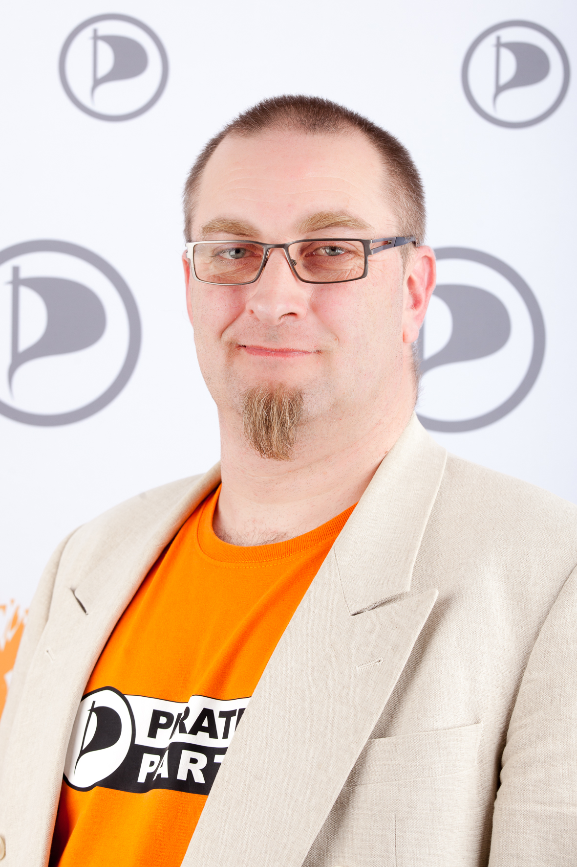 Landesvorsitzender der Piratenpartei Nordrhein-Westfahlen und Inhaber des Listenplatz 19 zur Bundestagswahl 2013